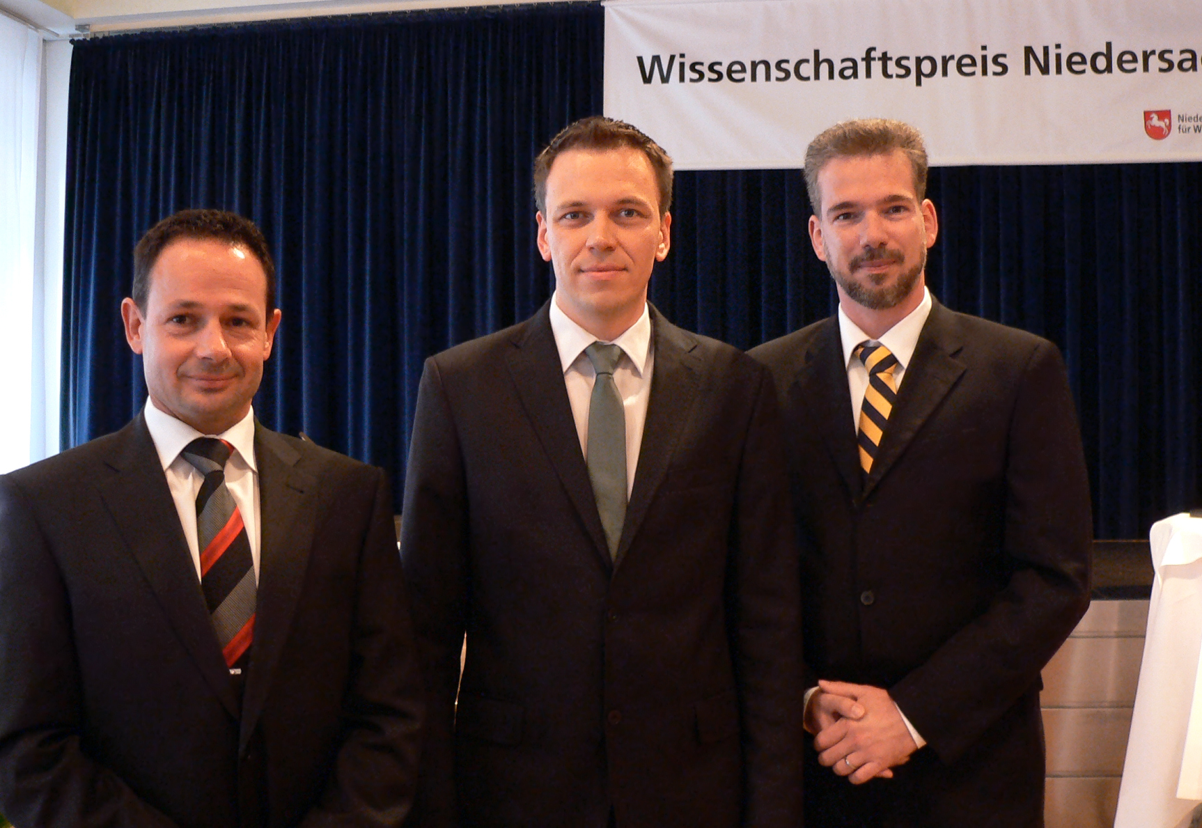 Preisträger des Wissenschaftspreises Niedersachsen,von links nach rechts: Hans-Josef Endres, Hochschule Hannover (Maschinenbau), Viacheslav Nikolaev, Georg-August-Universität Göttingen (Kardiologie), Marcus A. Magnor, Technische Universität Braunschweig (Computergrafik)